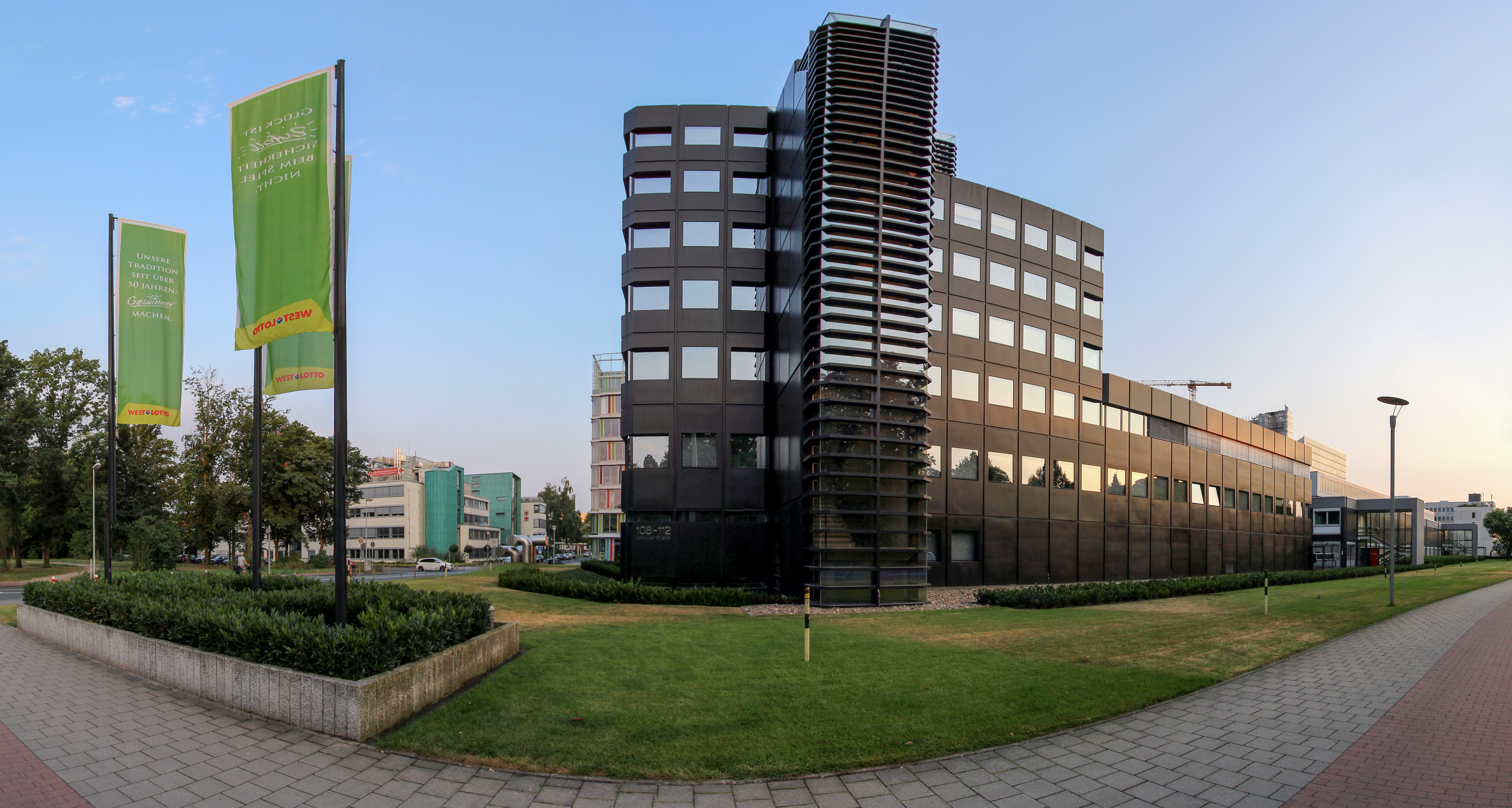 Bürogebäude der Westdeutschen Lotterie (Münster), Ansicht von der Weseler Straße Building TitleWestdeutsche LotterieArchitectHarald DeilmannDate1958, 1978, 1994